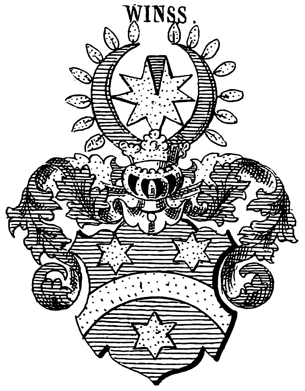 Wappen derer von Wins